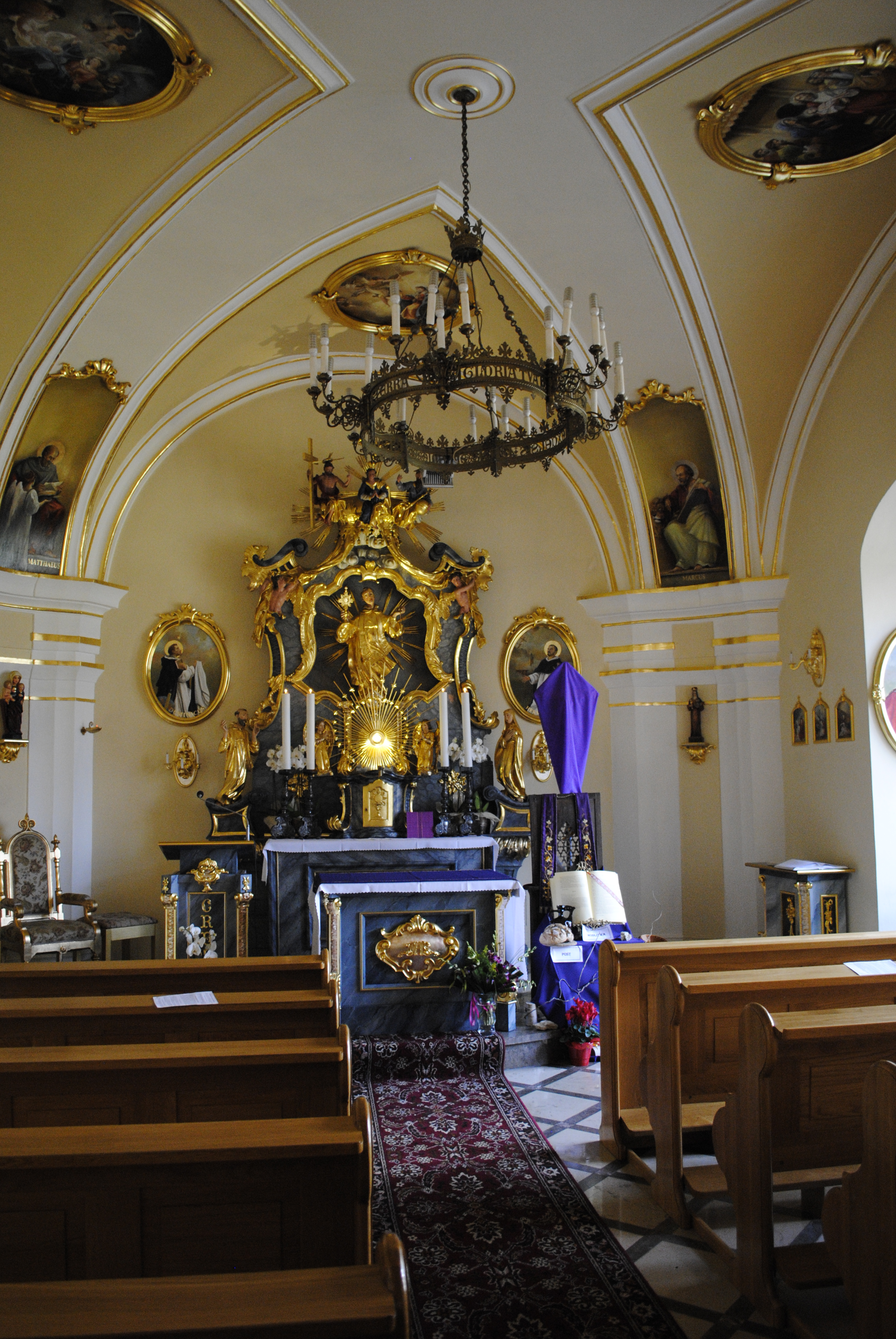 Kapelle im Schloss von Gross Stein